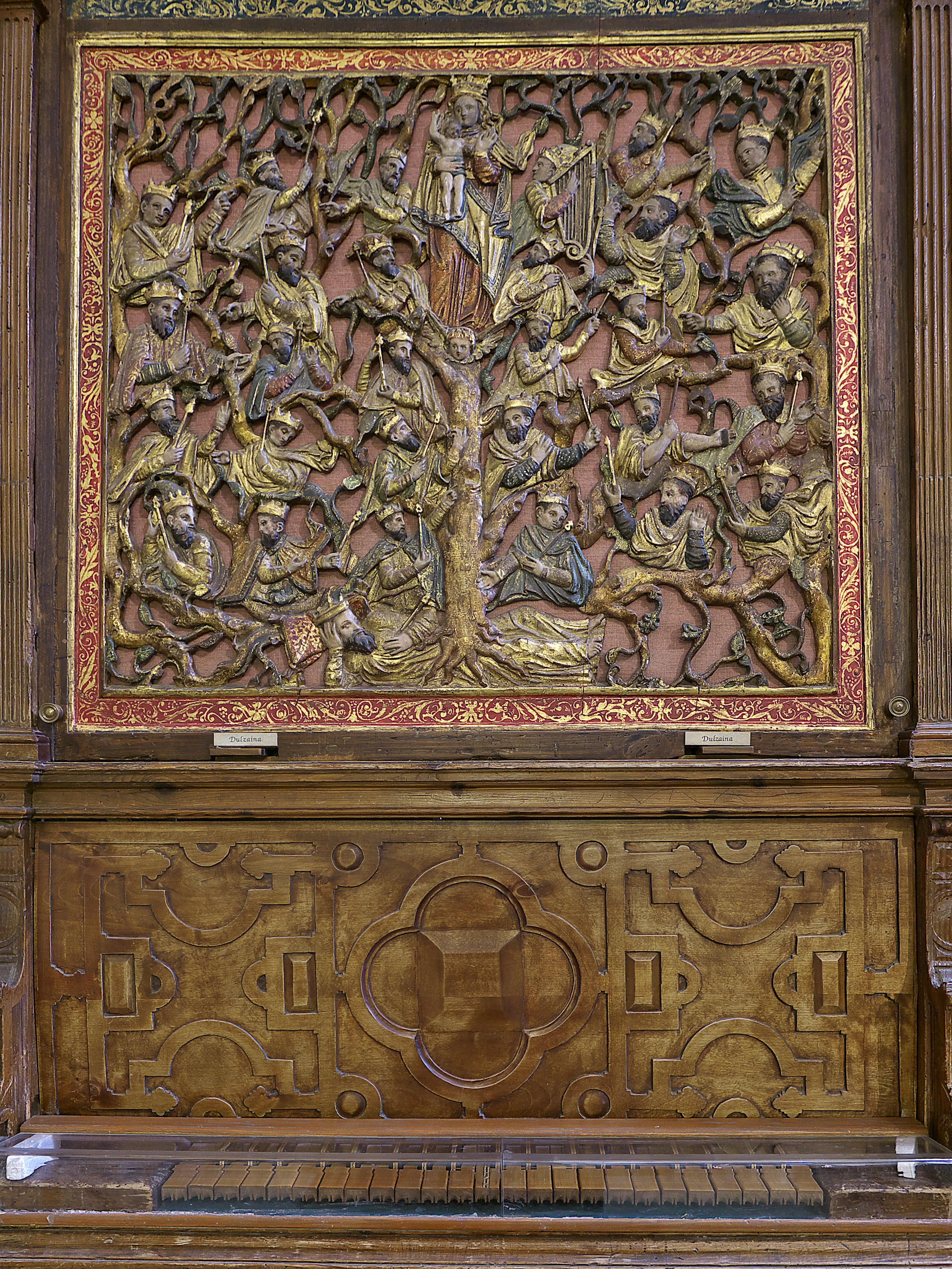 En el órgano preferido de Francisco de Salinas, la decoración con un Árbol real de Jessé.